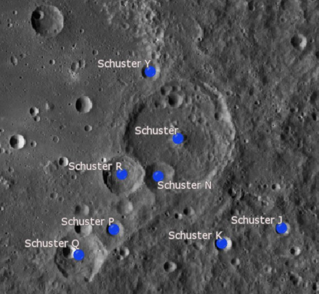 Cráter lunar Schuster. Cráteres satélite. (Imagen LRO)